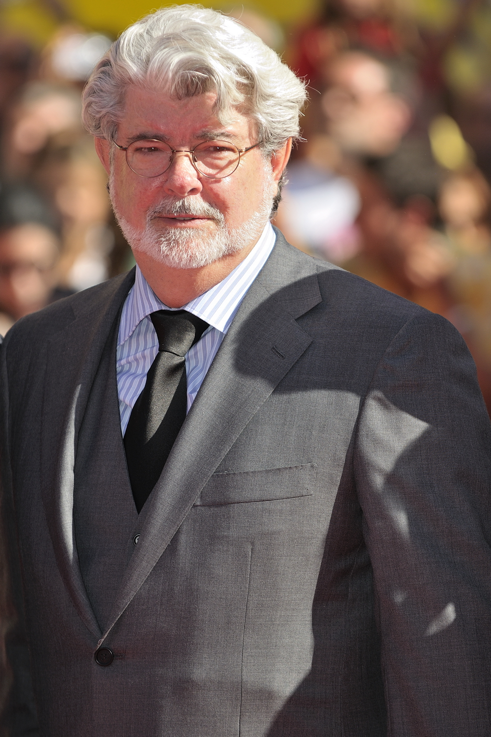 66ème Festival du Cinéma de Venise (Mostra), 5ème jour (06/09/2009) Geaorges Lucas et les réalisateurs de Pixar receoivent un Lion d'Or pour l'ensemble de leur carrière : John Lasseter (Toy Story, 1001 Pattes, Cars...), Brad Bird (Les Indestructibles, Ratatouille), Pete Docter (Monstres et Cie, Là-haut), Andrew Stanton (Le Monde de Nemo, WALL•E) et Lee Unkrich (Toy Story 2, Monstres et Cie, Le Monde de Nemo)